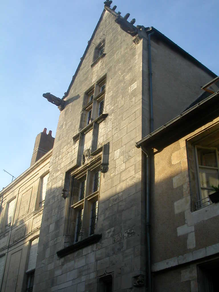 Maison des "Trois Clous" ou Maison de Charles VII (Grande-Rue 118), à Poitiers